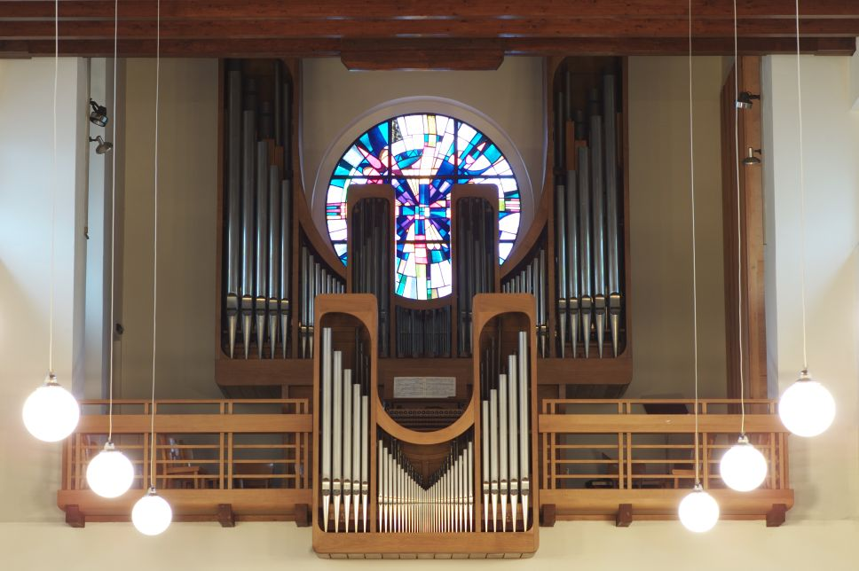 Orgel von Mater Dolorosa